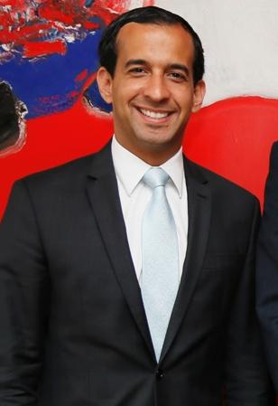 Prefeito de Santos (SP), Paulo Alexandre Barbosa (PSDB). Foto: Elisabete Alves/MinC